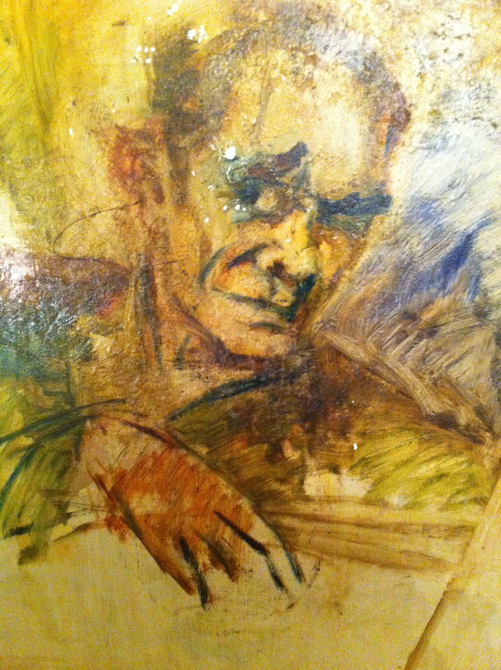 Dieses Selbstporträt hat der Künstler wenige Tage vor seinem Tod gemalt.